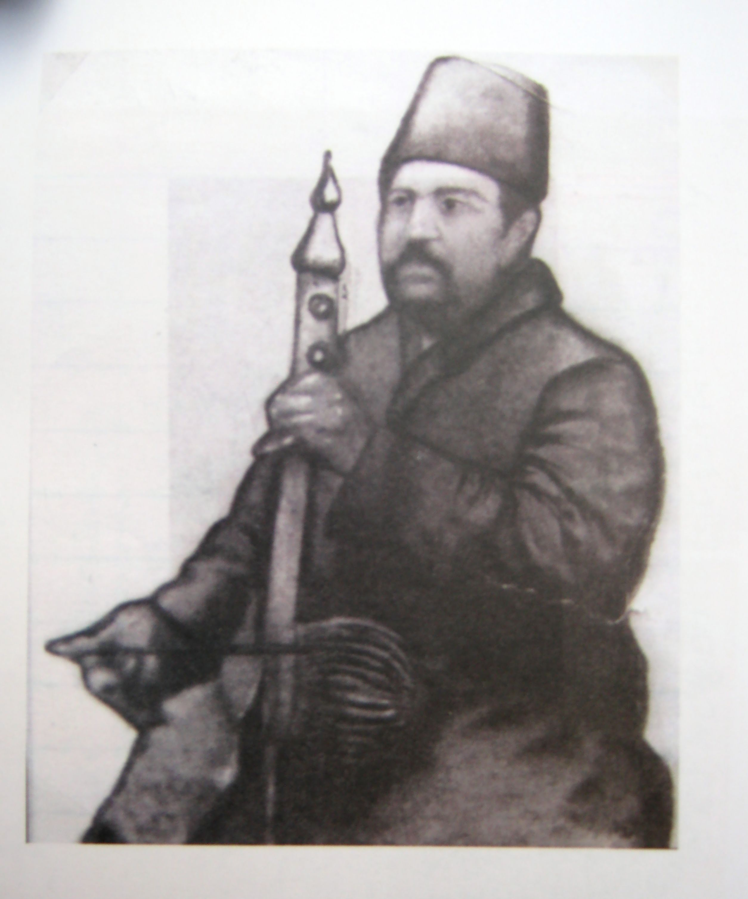 نوازنده بهاری احتمالا دوره قاجار